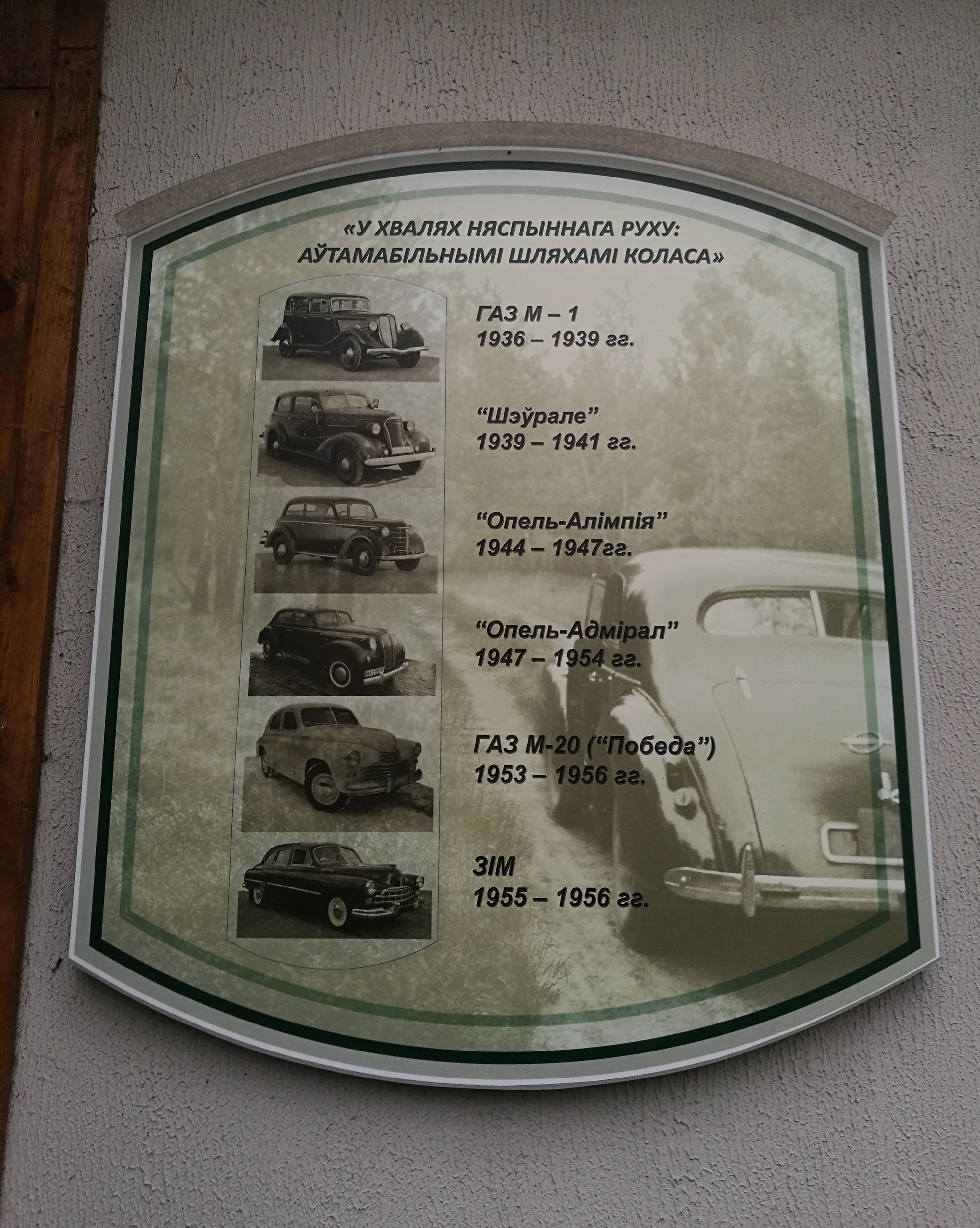 Інфармацыйная дошка з Дома-Музею Якуба Коласа ў Мінску. Распавядае, якімі мадэлямі аўтамабіляў валодаў пісьменнік у розныя годы свайго жыцця.